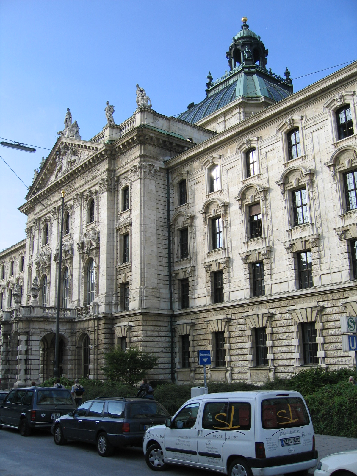 Description: Justizpalast; Gebäude des Landgerichtes München I, Prielmayer Straße 7 in München (Germany) Source: selbst fotografiert Date: 14. Sept. 2005 Author: Bubo